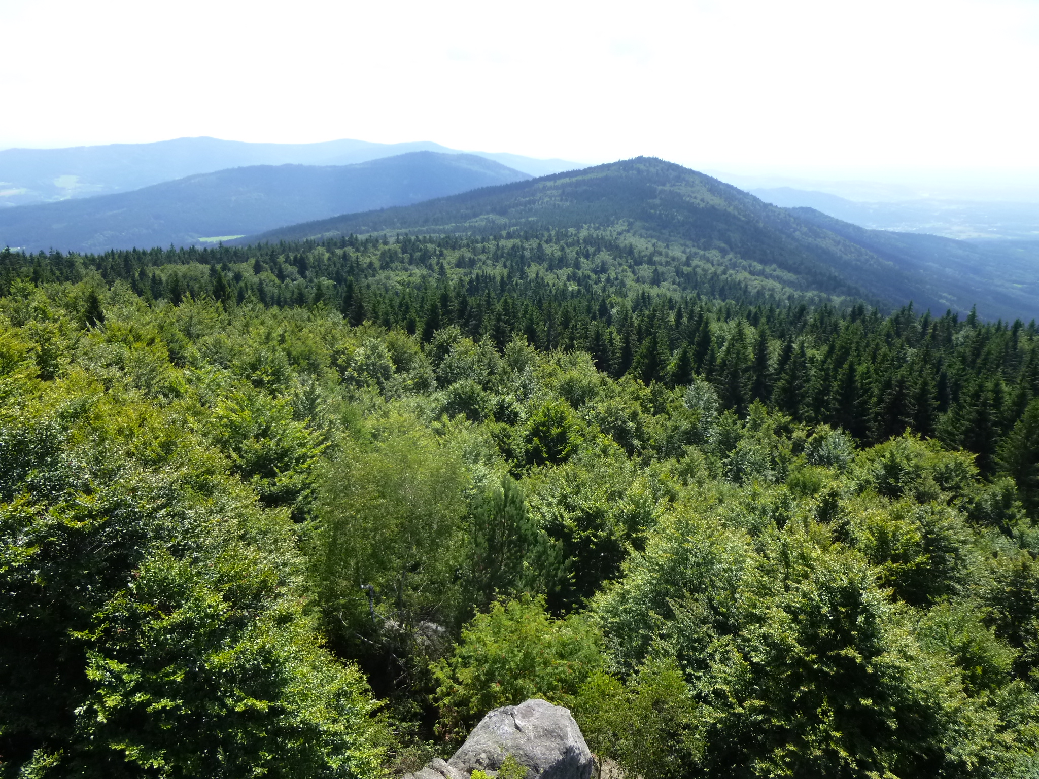 Blick vom Hirschenstein-Gipfel auf die Bergrücken des Bayerischen Waldes